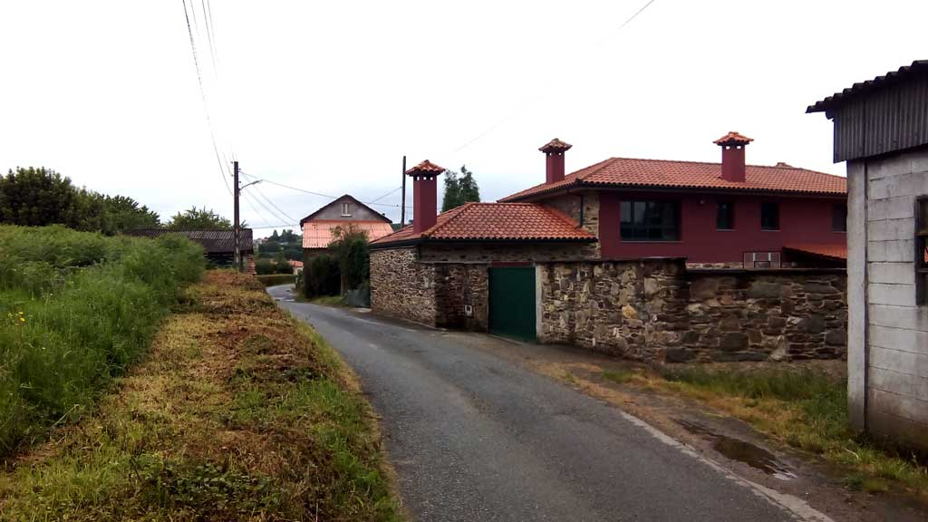 Vista dos Castros, Andrade.